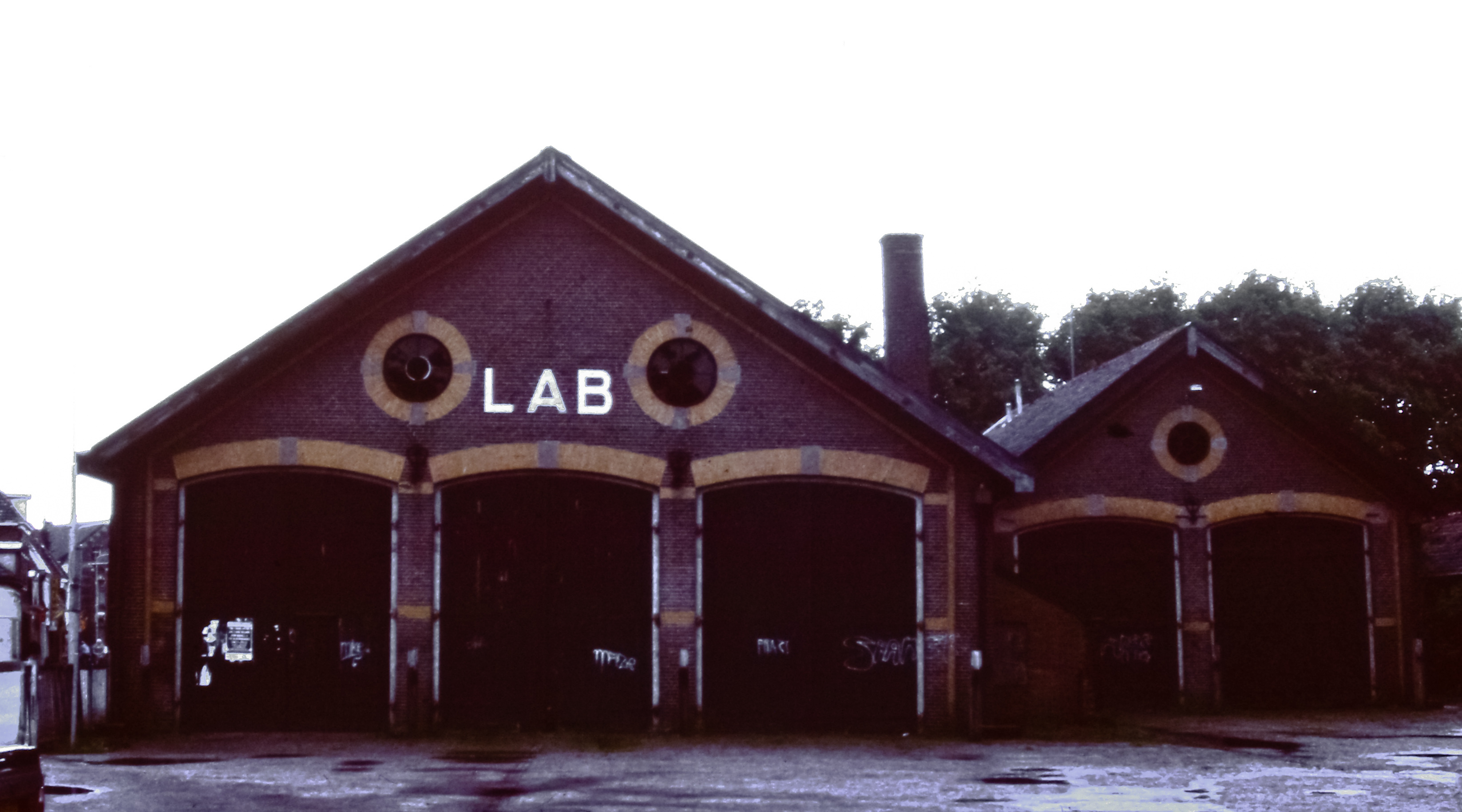 Stalling en garage van de Leeuwarder Auto Bedrijf (LAB) te Bolsward. Dit was oorspronkelijk een Nederlandsche Tramweg Maatschappij (NTM) depot, links de rijtuigenloods en rechts de locomotieven loods.